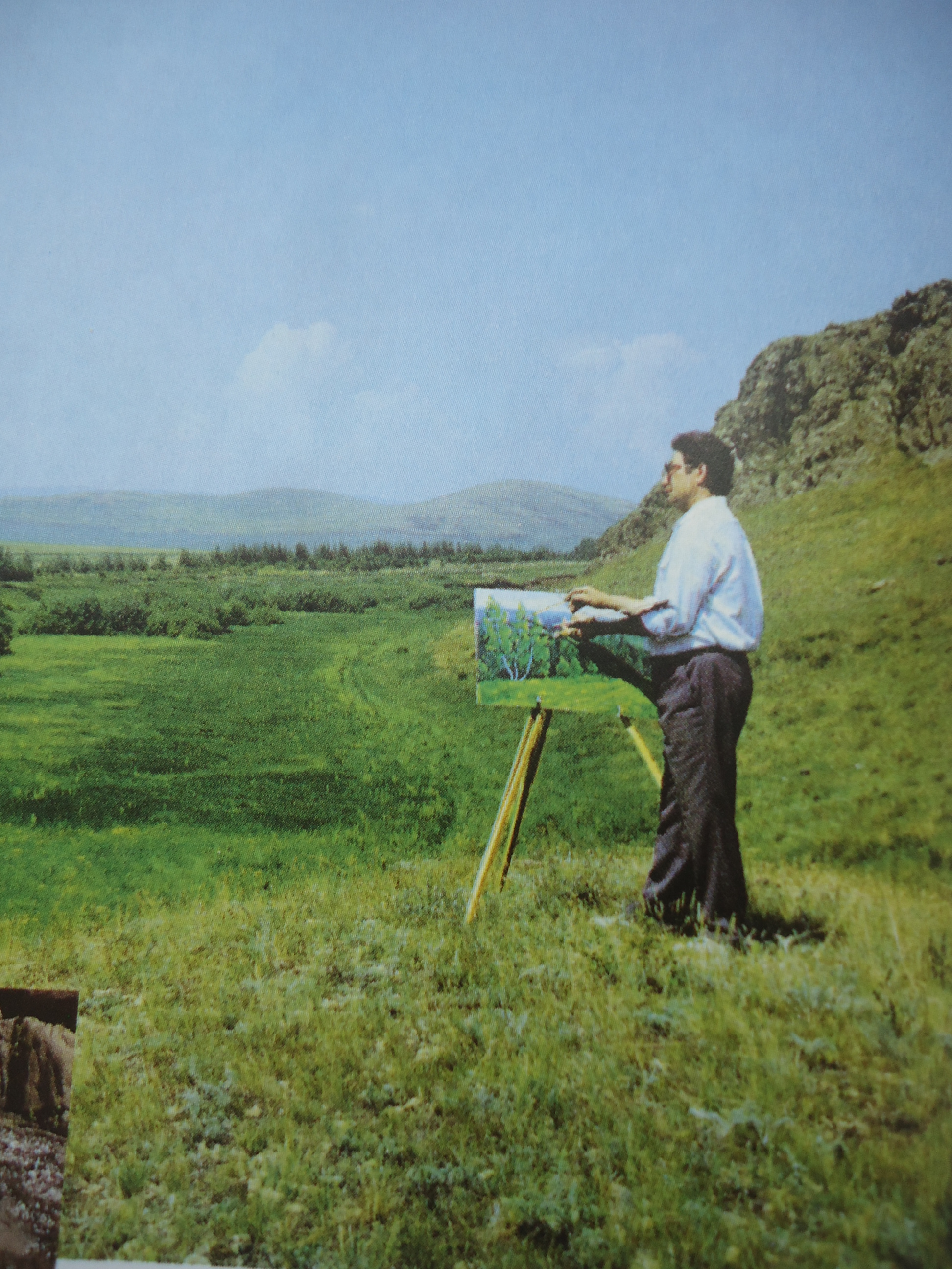 Башҡортса: Байрамғолов Миҙхәт Әсфәндиәр улы - педагог, шағир, рәссам. Башҡортостан, Баймаҡ районы.